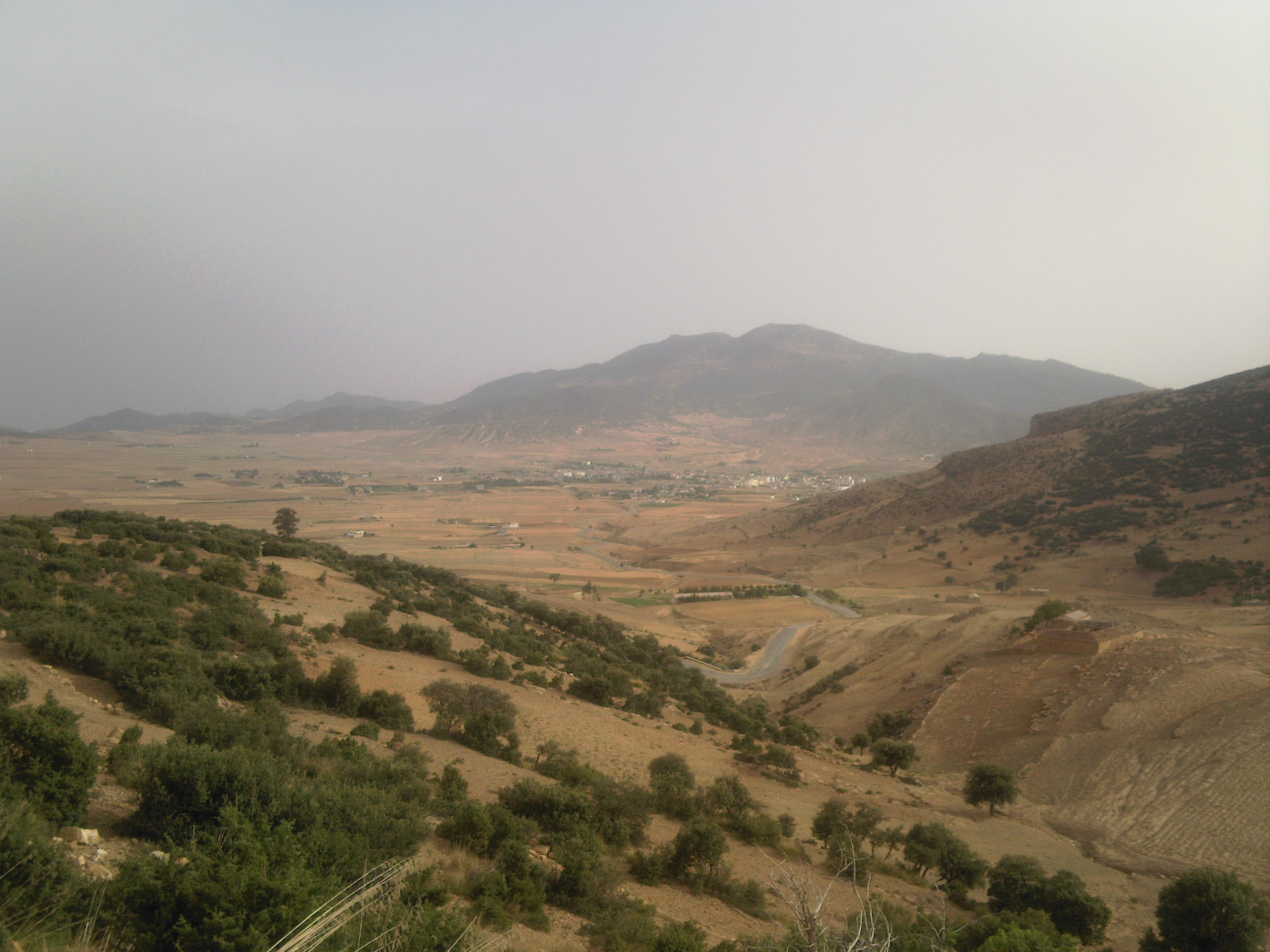 Le village d'Ouled Tebben vu de la route de Ras El Oued